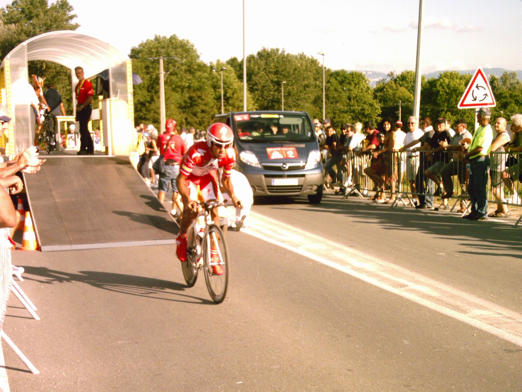 Robinson Chalapud au départ du contre-la-montre de la troisième étape b du Tour de l'Ain 2009.